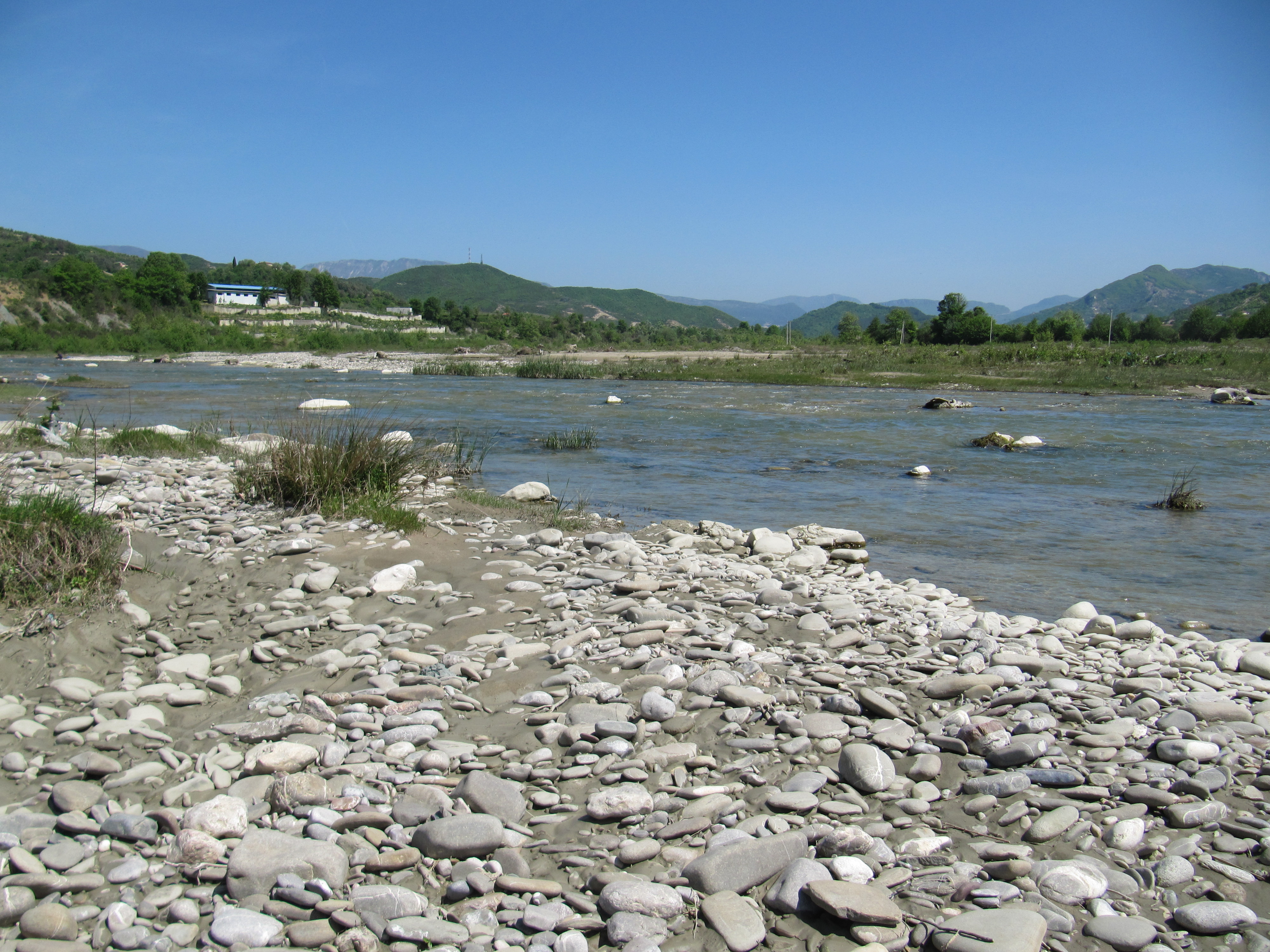 Lumi Erzen në jug të Tiranës, në afërsi të fshatit Arbanë